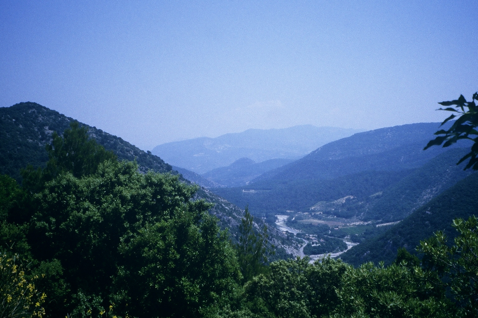 Vue de la vallée de l'Eygues depuis le col du Ponthias à Nyons, Drôme, France (juin 2002)